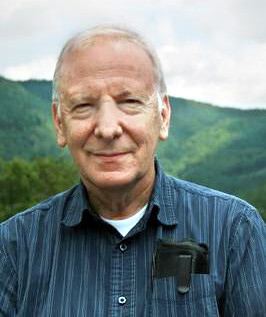 Foto di Robert Wald